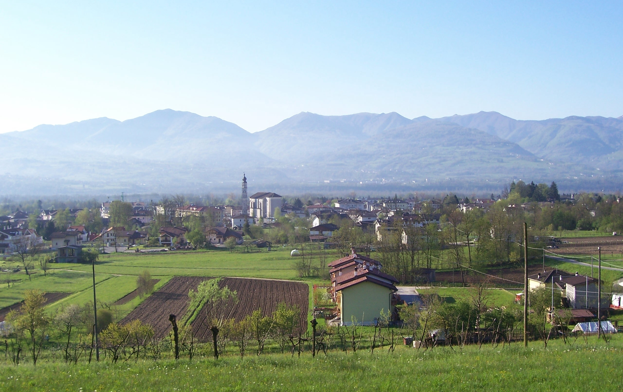 Santa Giustina Panorama